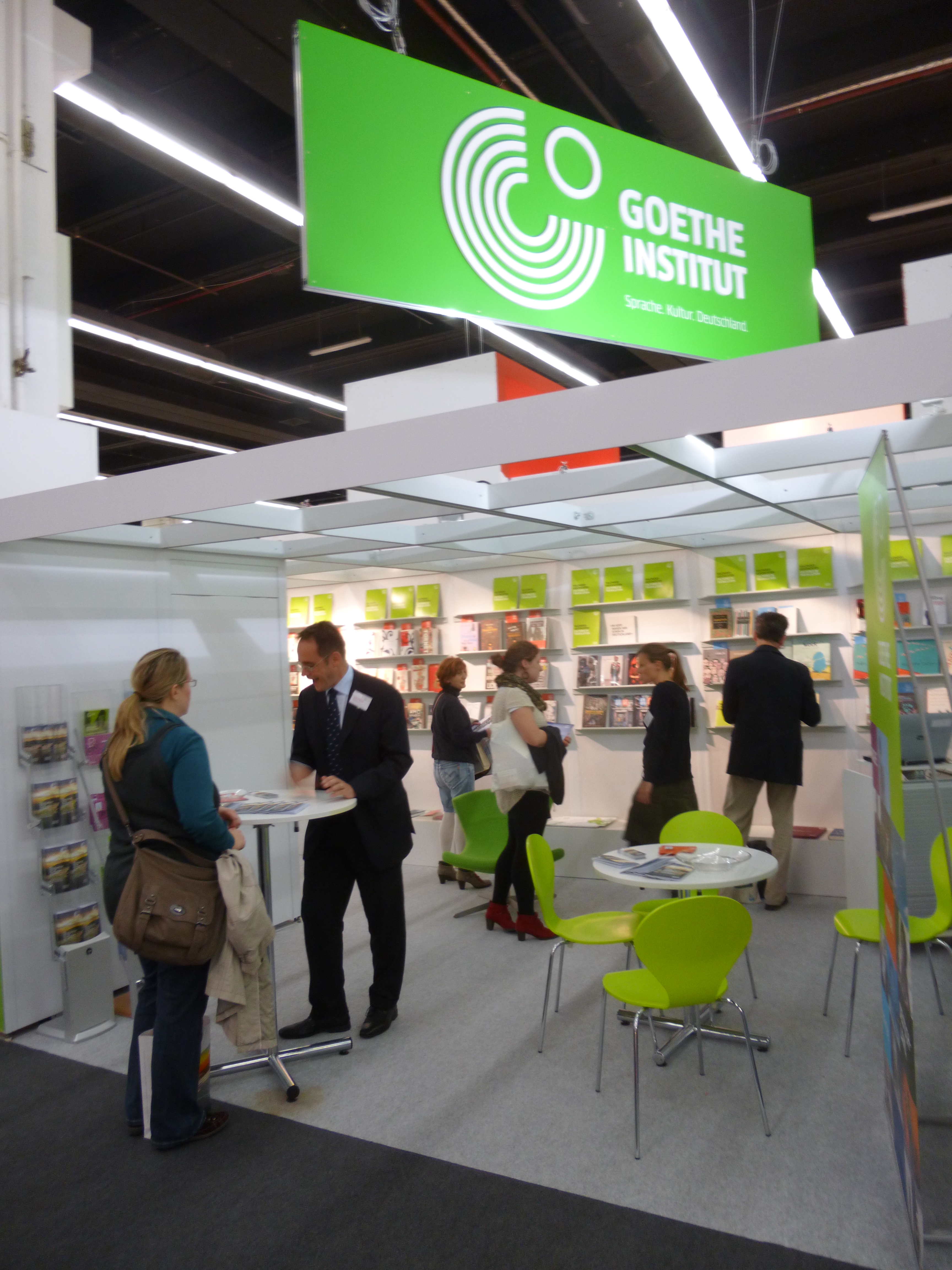 stando de la institucio Goethe-Institut pri instruo de la germana lingvo en la Frankfurta librofoiro 2012